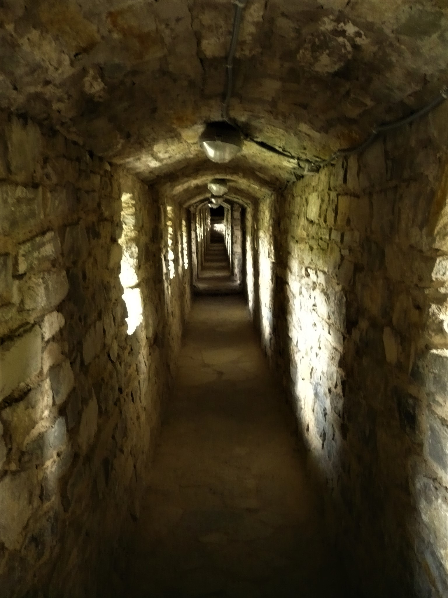 Zamek w Kamieńcu Podolskim. Przejście między basztami